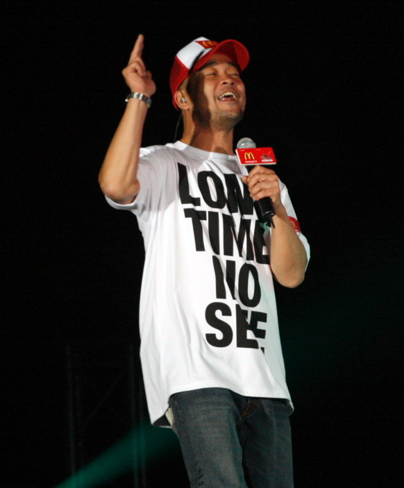 Eric Kot